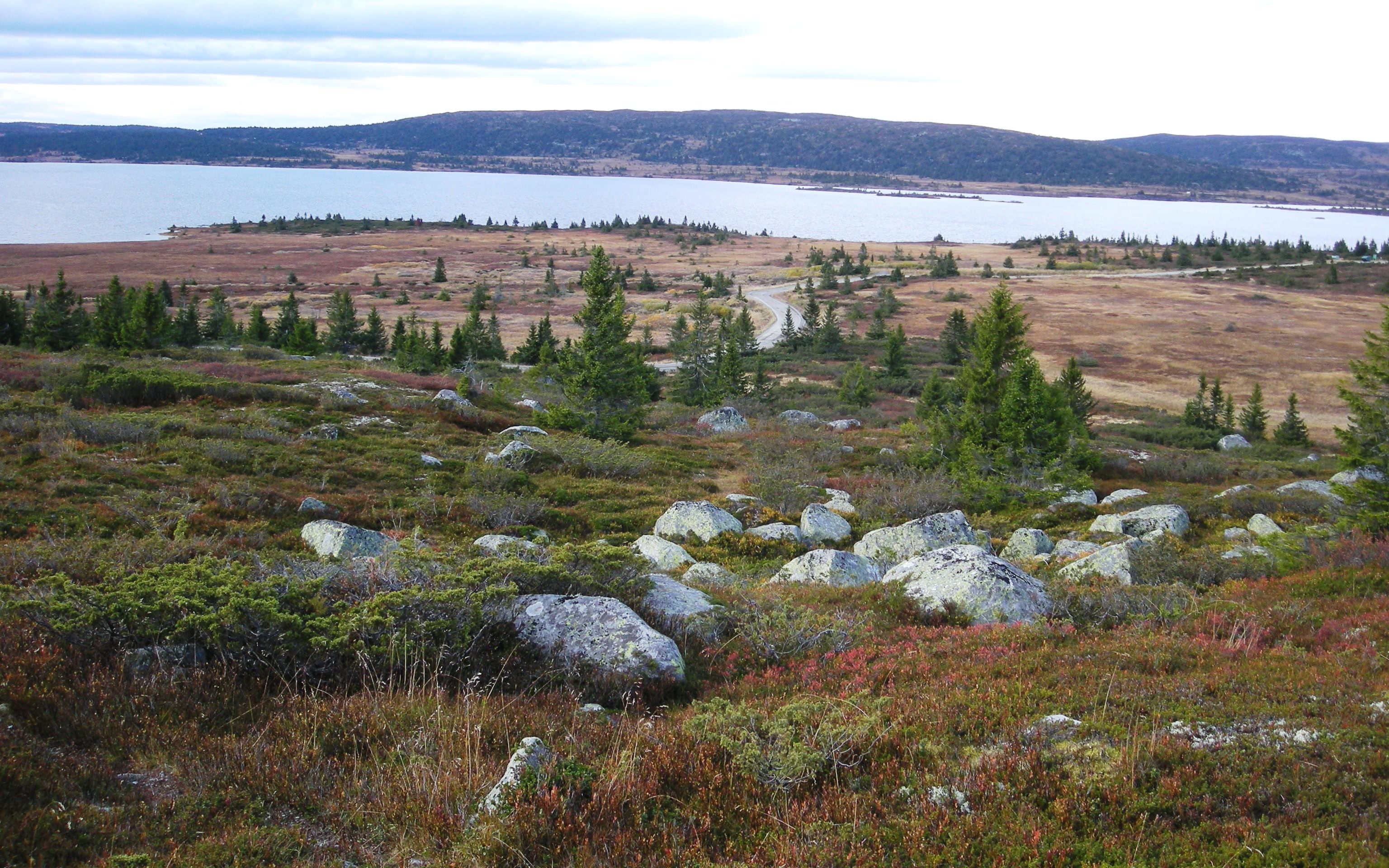 Reinsvatnet